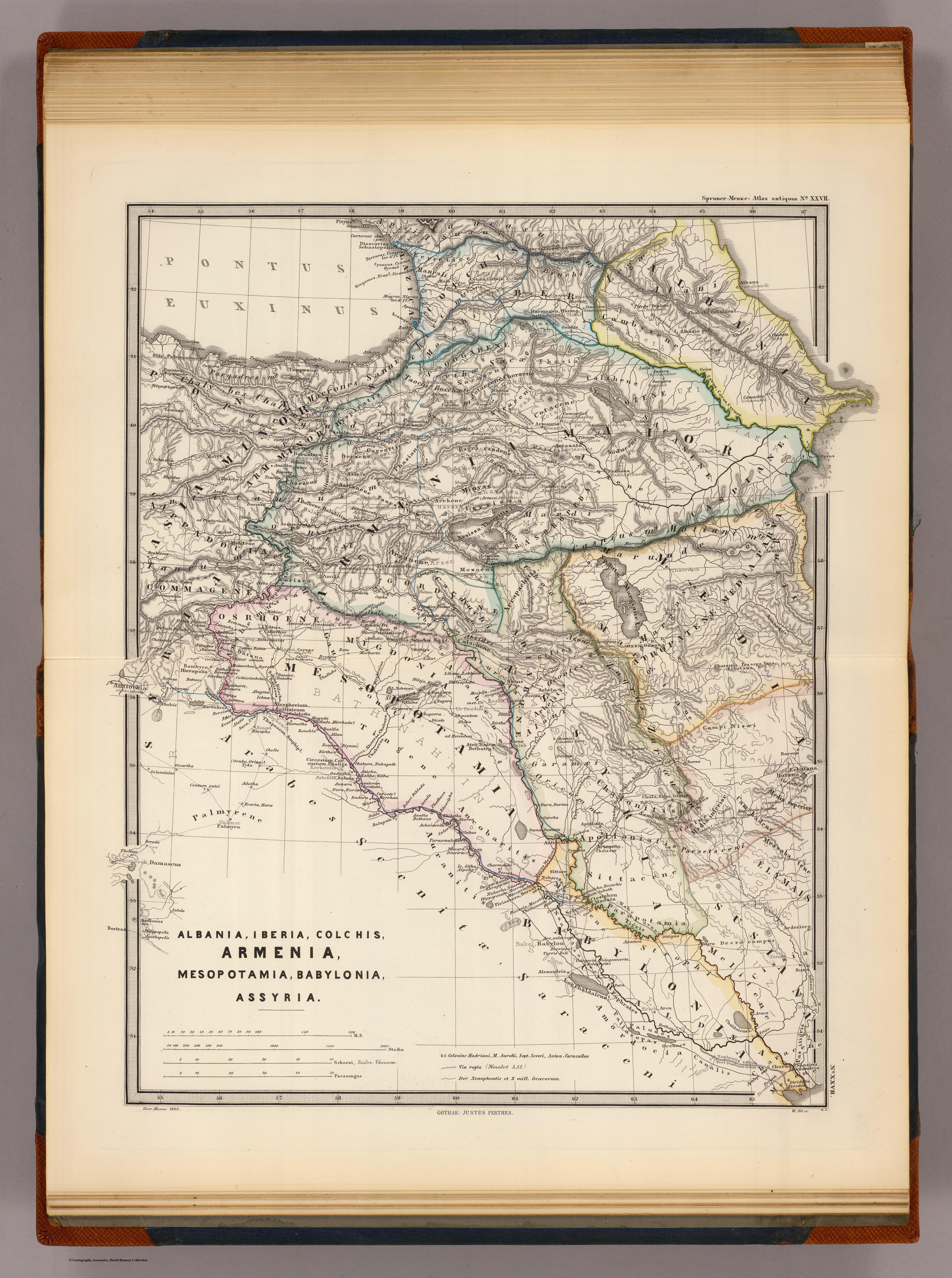 Albania, Iberia, Colchis, Armenia, Mesopotamia, Babylonia, Assyria. Corr. Menke 1863. W. Alt sc. Gothae: Justhus Perthes. Spruner-Menke atlas antiquus. (1865)